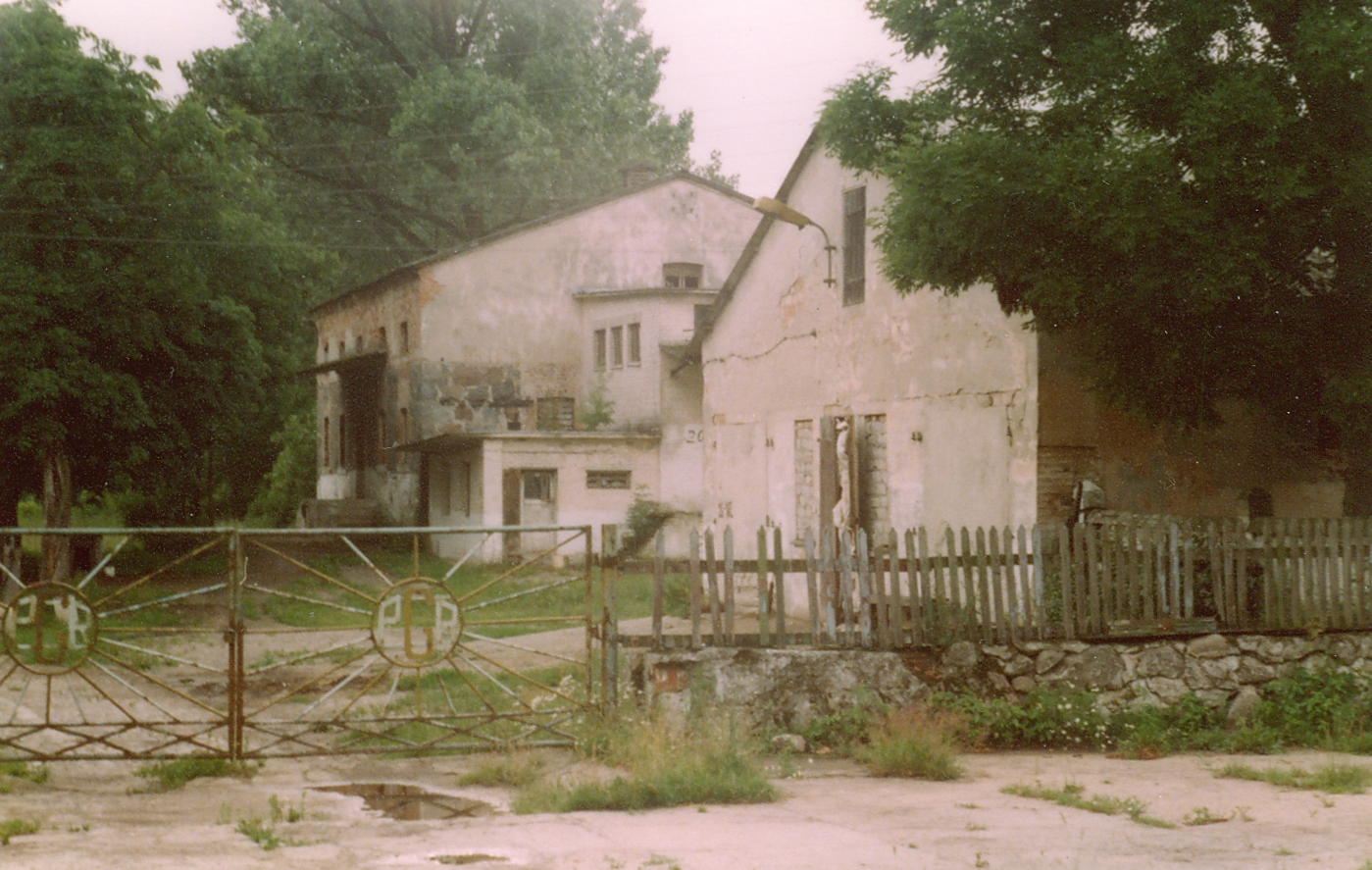 Dominek, zamknięta stara owczarnia